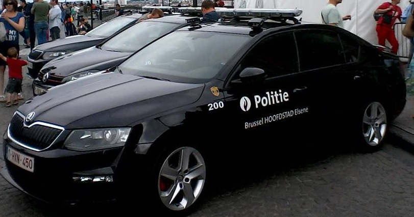 Skoda RS ANPR BAA/AOB